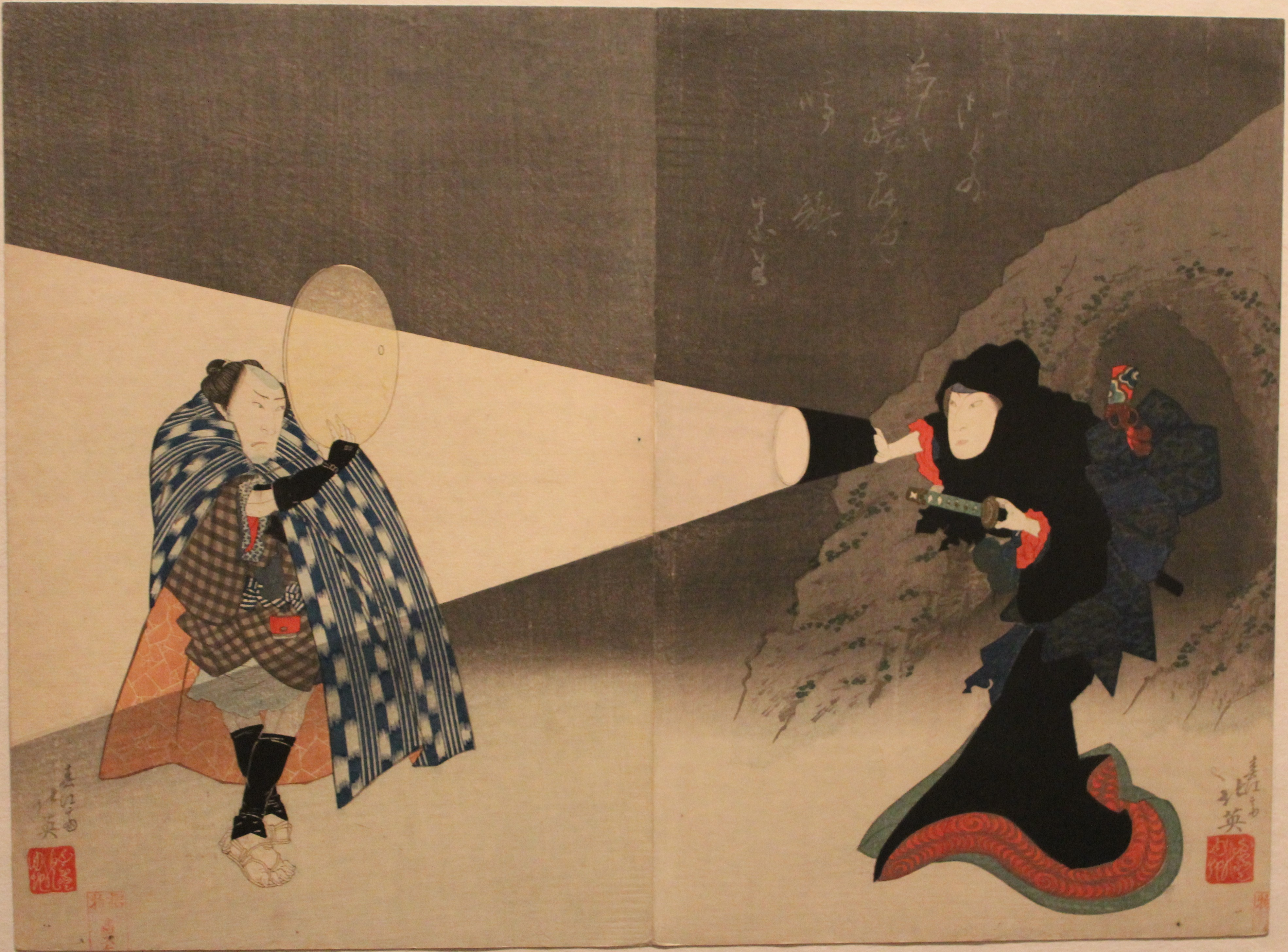 estampe japonaise au Musée des Beaux-Arts de Rennes